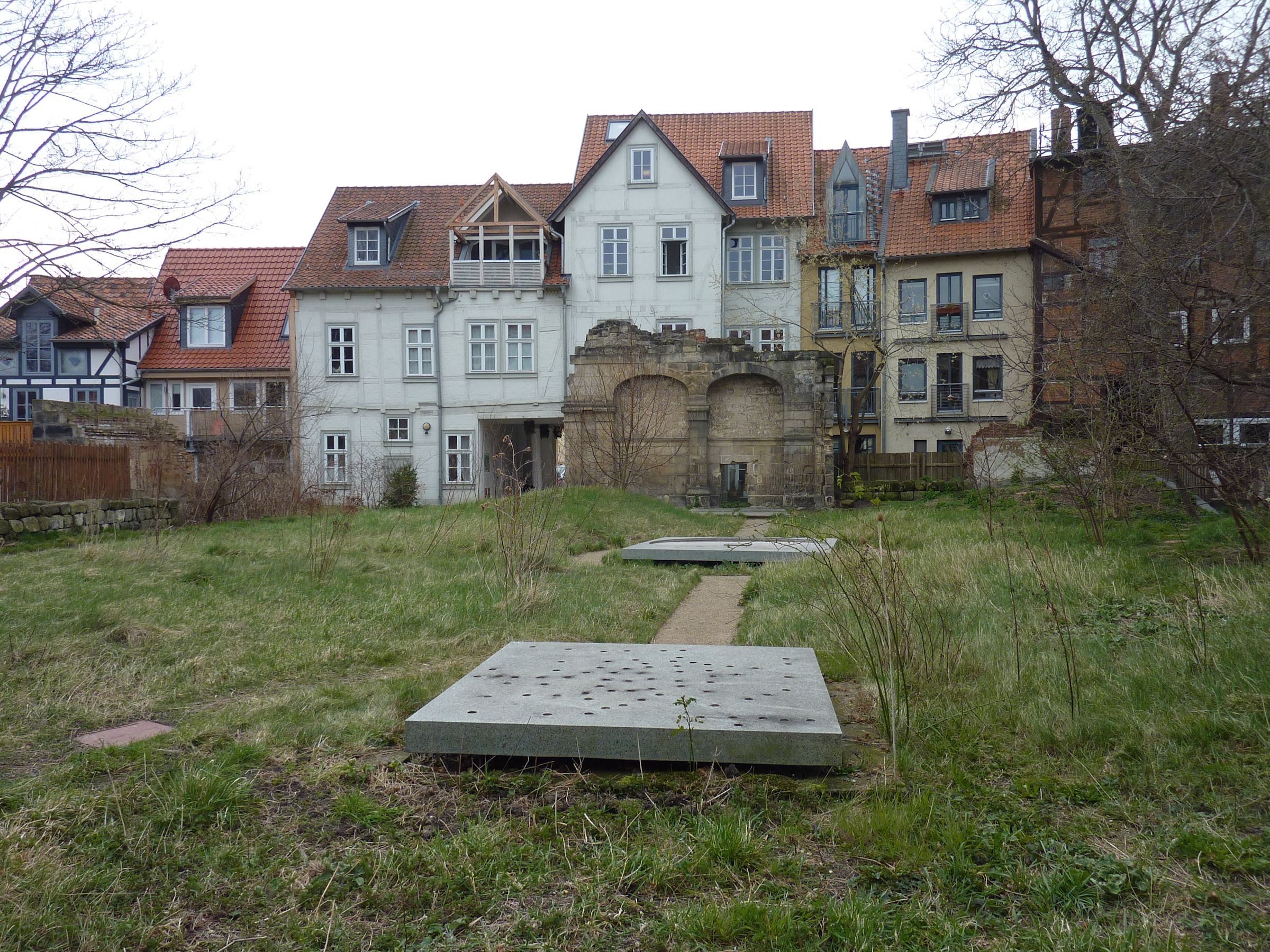 Überreste der Synagoge in Halberstadt